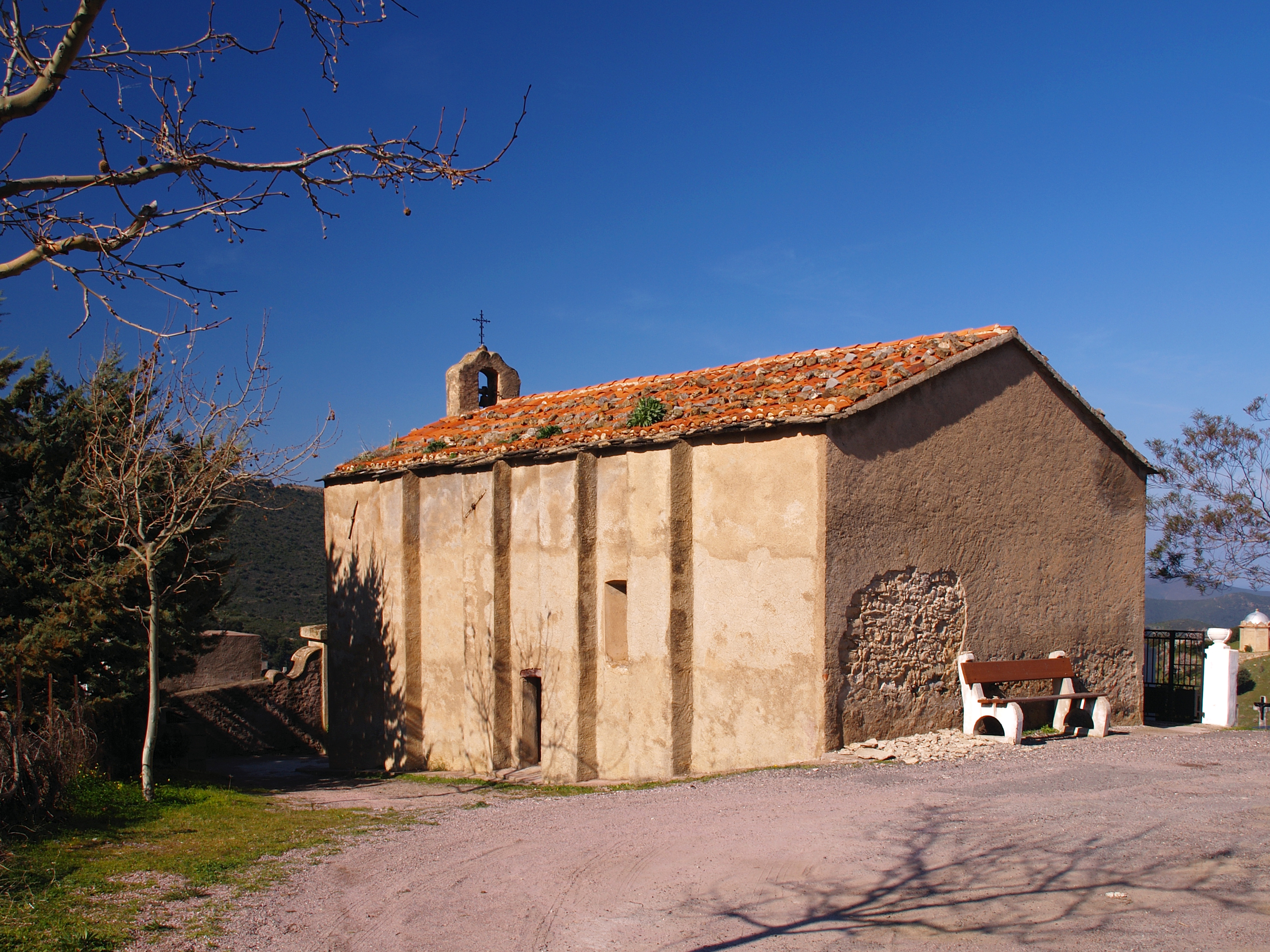 Novella, Balagne (Haute-Corse) - Chapelle Saint-Michel